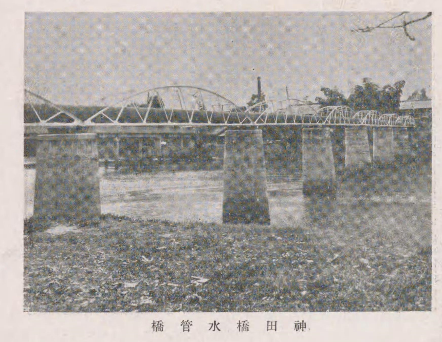 1930年代の広島市の神田橋水管橋